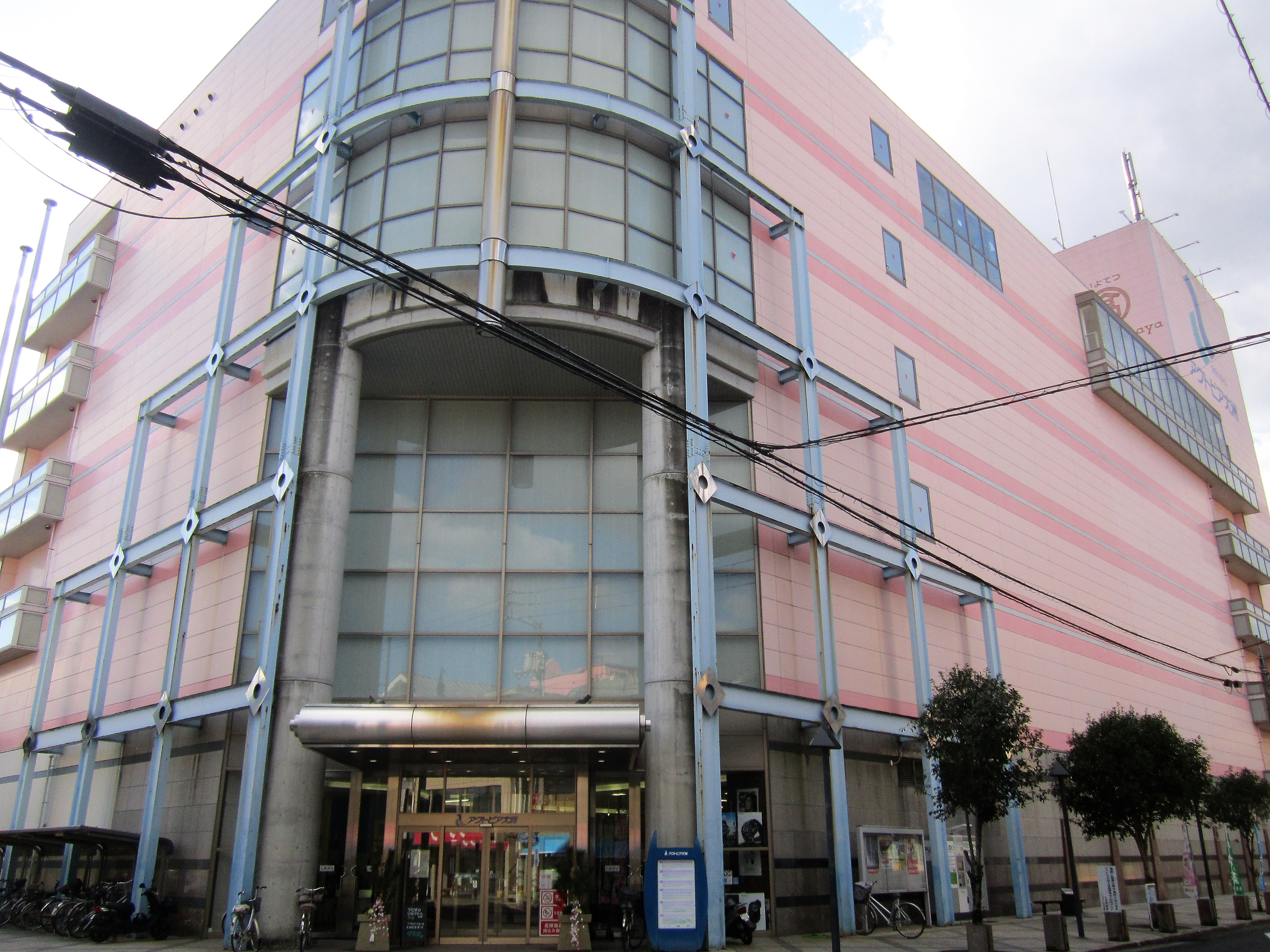 アクトピア大洲（フジグラン大洲・伊予鉄高島屋大洲店などが入居）